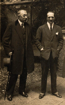 Pierre de Bréville (1861-1949) composer & Jacques Thibaud (1880-1953) violinist